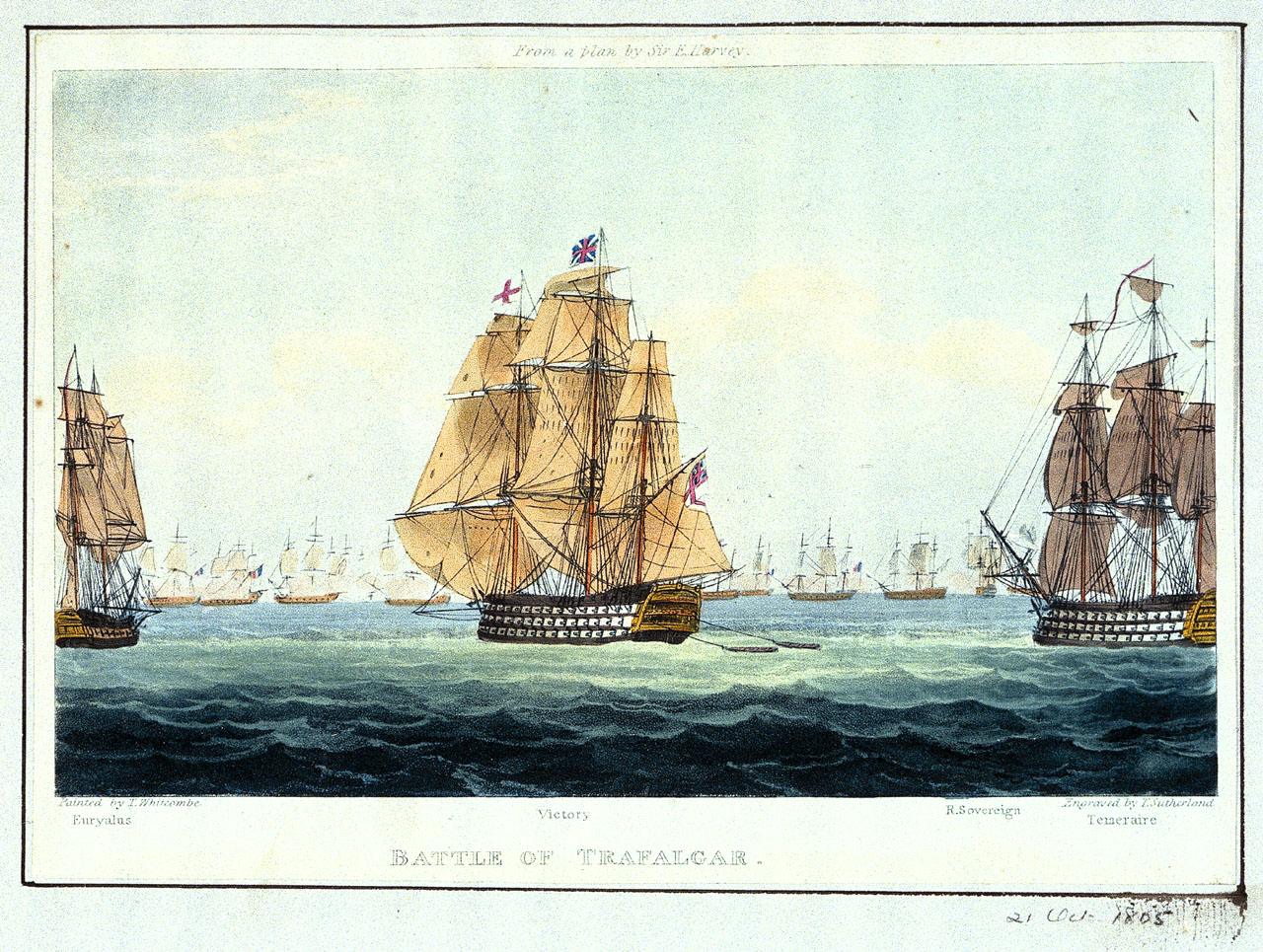 Начало Трафальгарского сражения. Фрегат Euryalus, флагман Нельсона Victory и 98-пушечный Temeraire, идут на сближение с франко-испанским флотом.